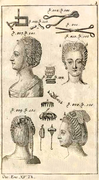 Brennzange und Brennschere (rechts oben) und andere Instrumente zur Haarbearbeitung